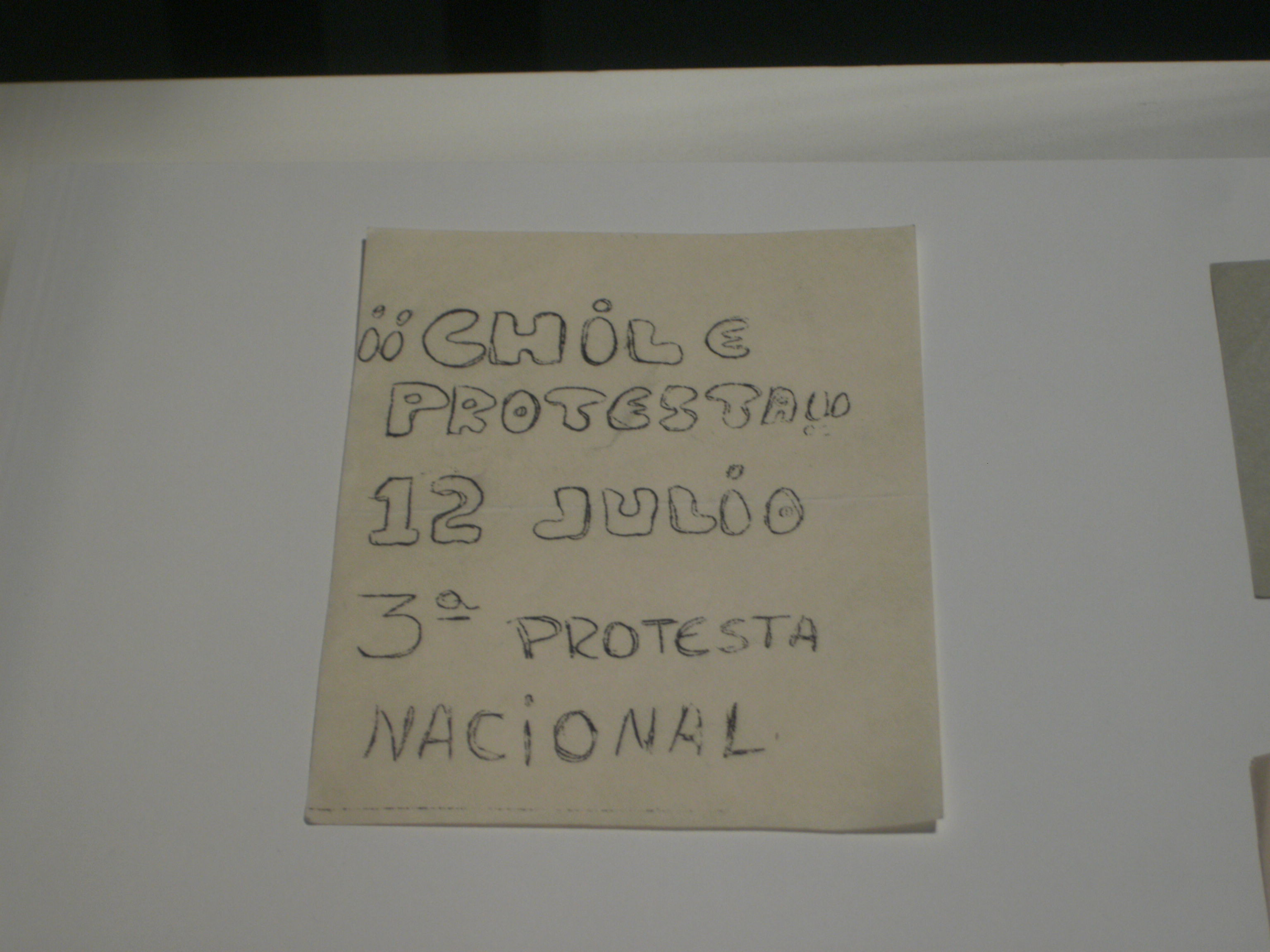 Aspectos del Museo de la Memoria y los derecho Humanos de Chile